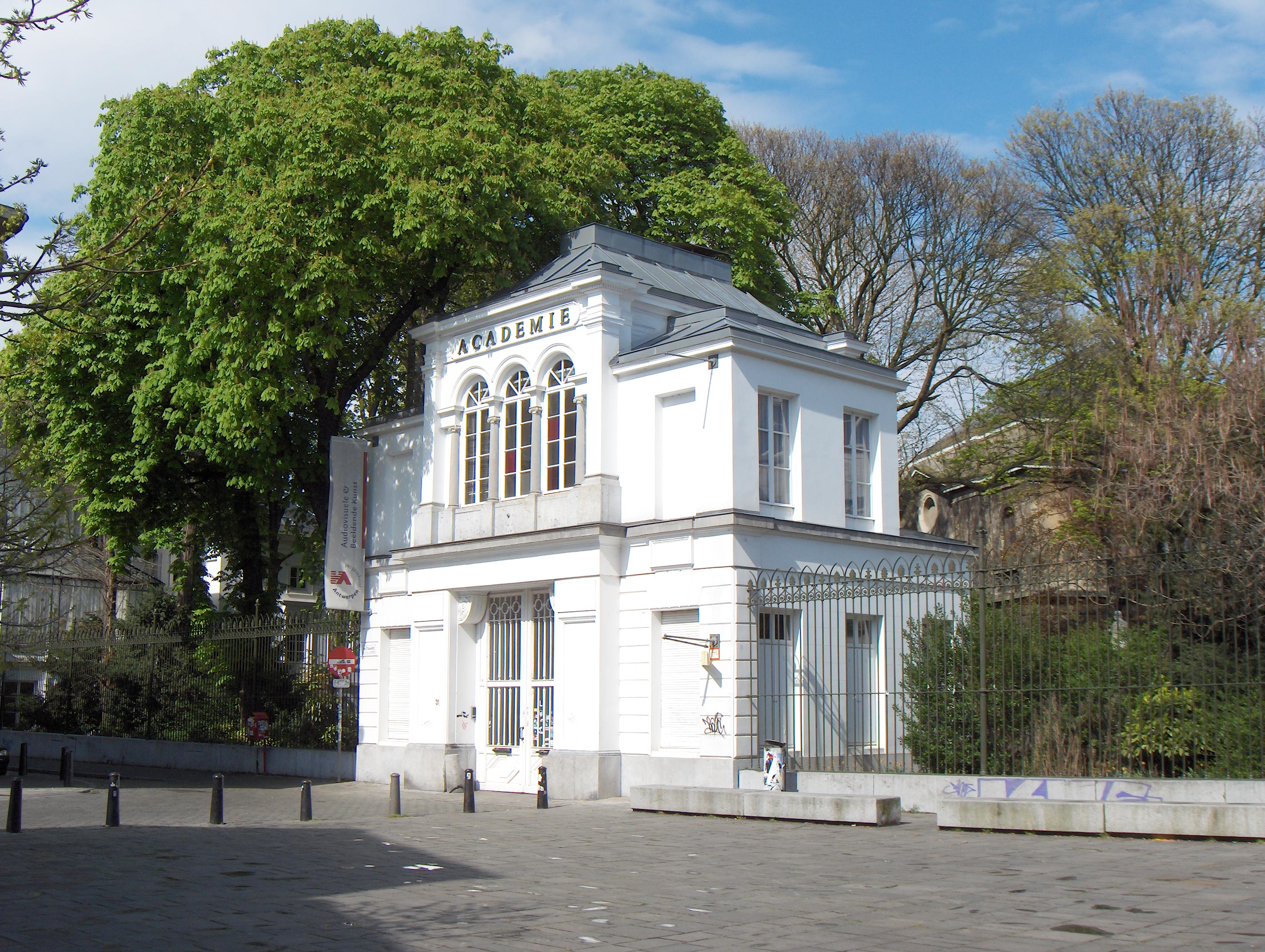 Beschreibung: Antwerpen (Belgien), Academie voor Schone Kunsten (Mutsaertstraat), 1841-1843 vom Architekten P. Bourla errichtet worden (Neuklassizismus). Datum: 30. April 2006 Fotograf: Friedrich Tellberg